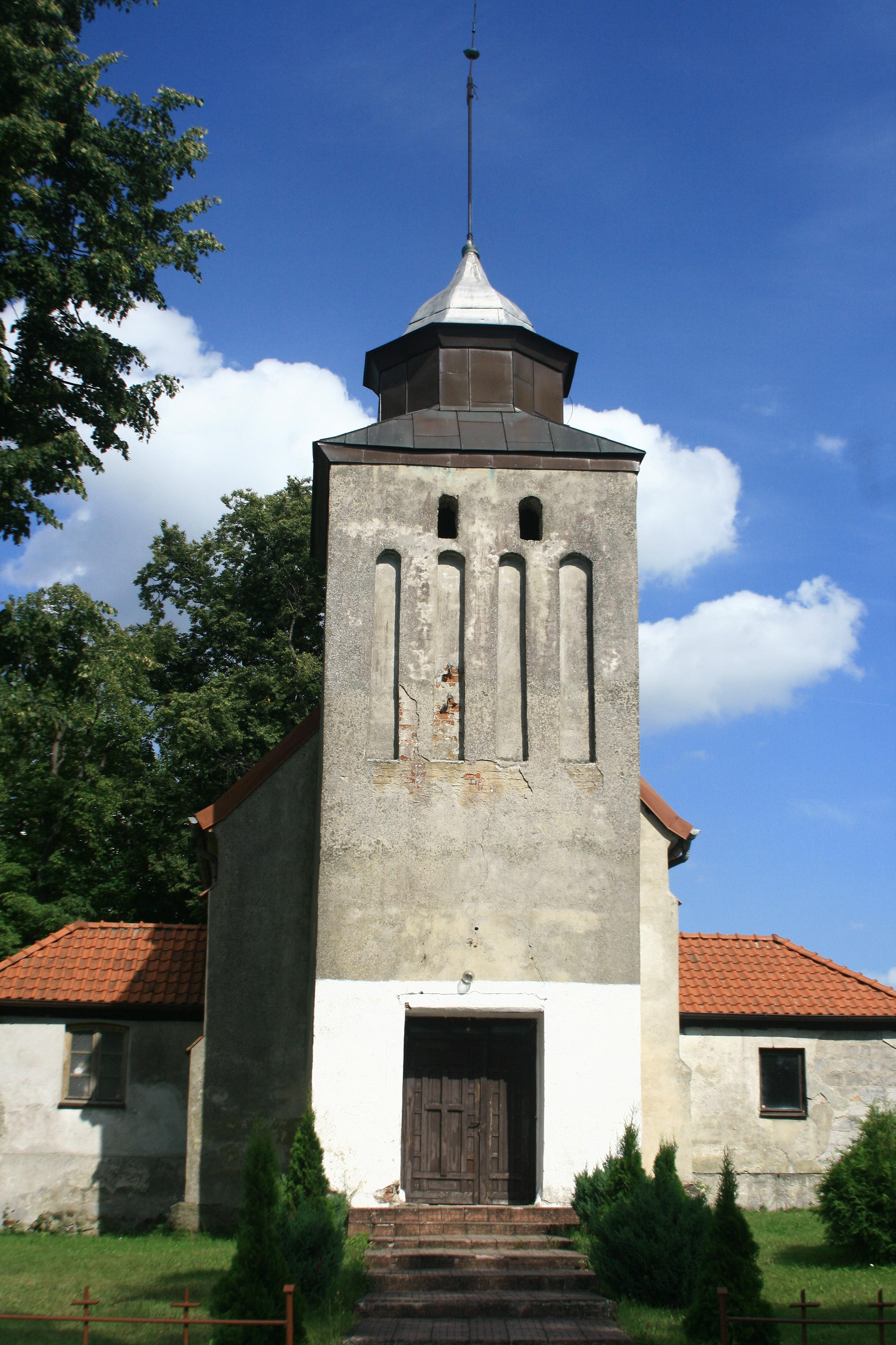 Kwasowo - dawny kościół ewangelicki, obecnie rzymskokatolicki filialny p.w. Niepokalanego Serca NMP, (XVI), XVIII